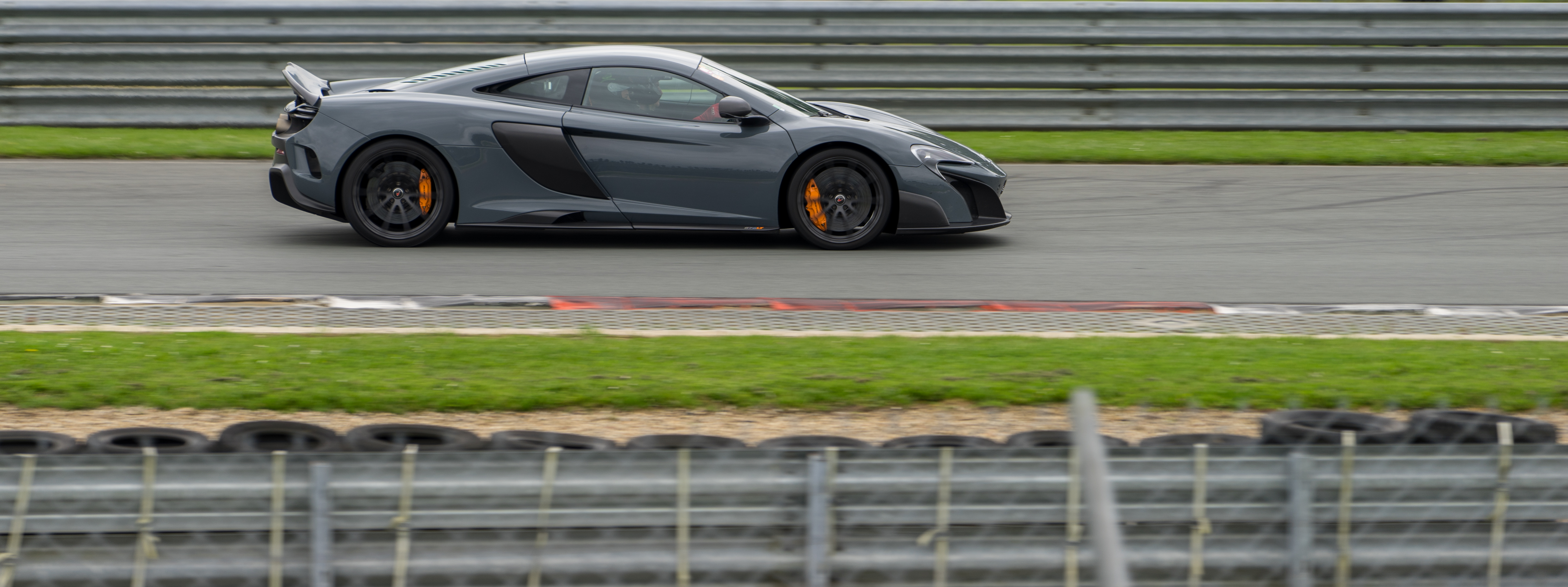 22e Sport et Collection - Le Vigeant